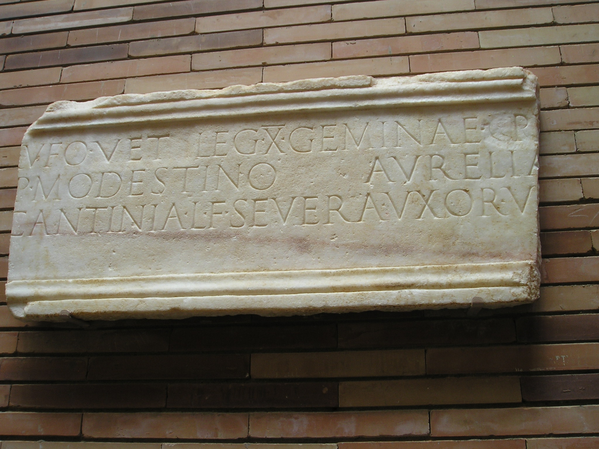 Inscripción funeraria romana procedente de Mérida (Badajoz, España), depositada en el Museo Nacional de Arte Romano de la localidad, correspondiente con ERAEmerita 126: -----] Rufo vet(erano) leg(ionis) X Geminae Cr[----/ ----]p Modestino Aurelia [-----/ ------] Cantinia L(uci) f(ilia) Severa uxor V[- ----/----- ] Aurelio L(uci) f(ilio) / [----] in s(uo?)